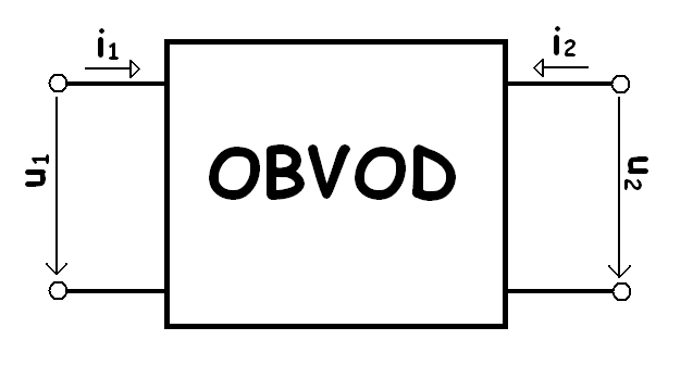 Blokové schéma zapojení dvojbranu